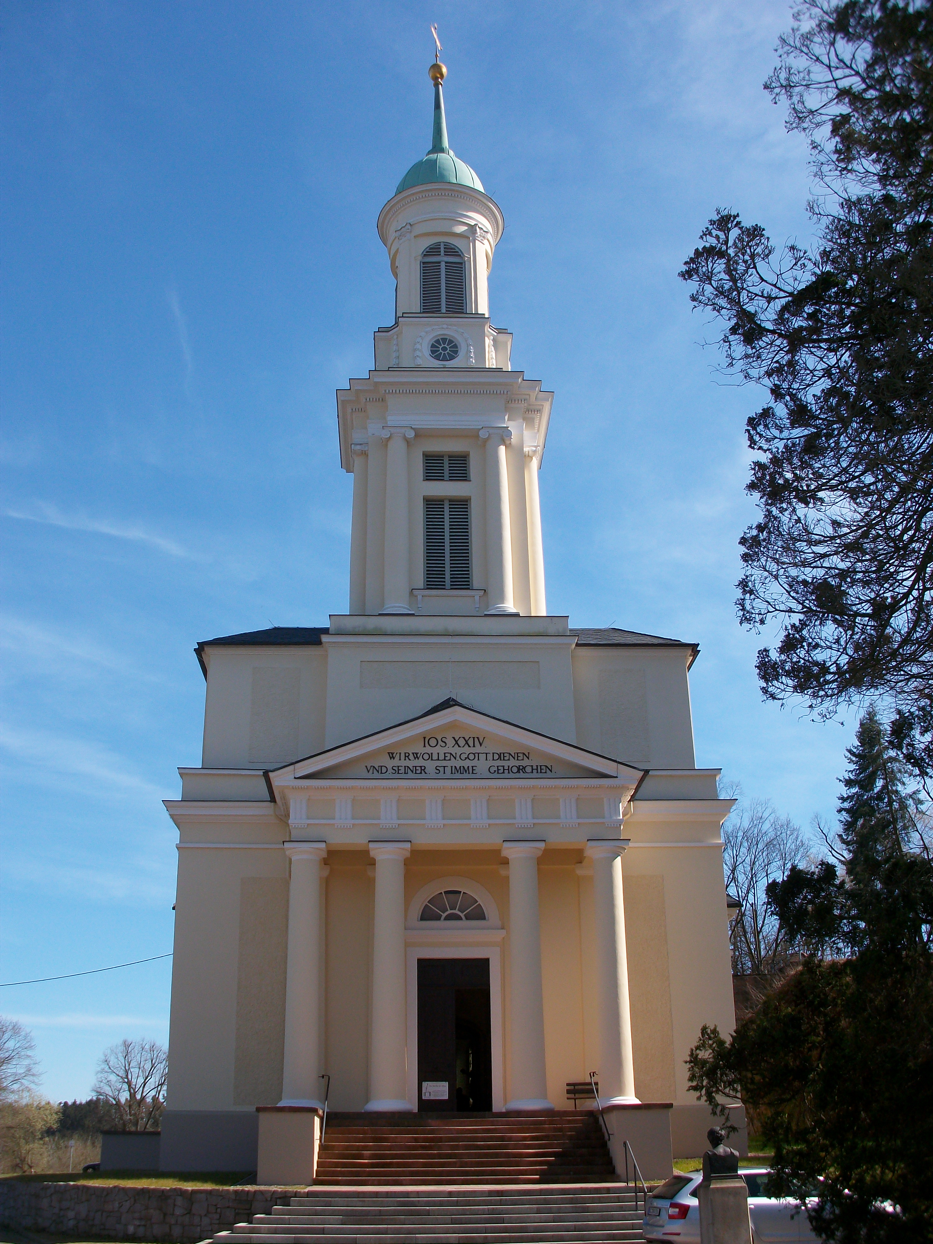 St. Mauritiuskirche Wolkenburg, Frontansicht